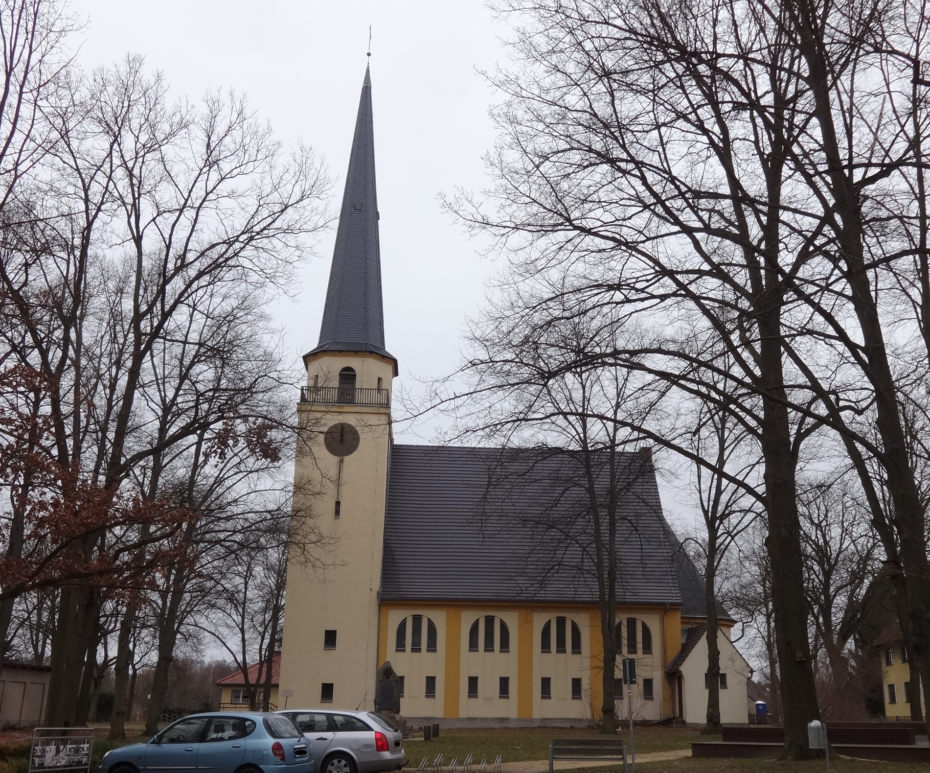 Christuskirche von Georg Büttner, im Heimatstil zwischen 1914 bis 1916 errichtet